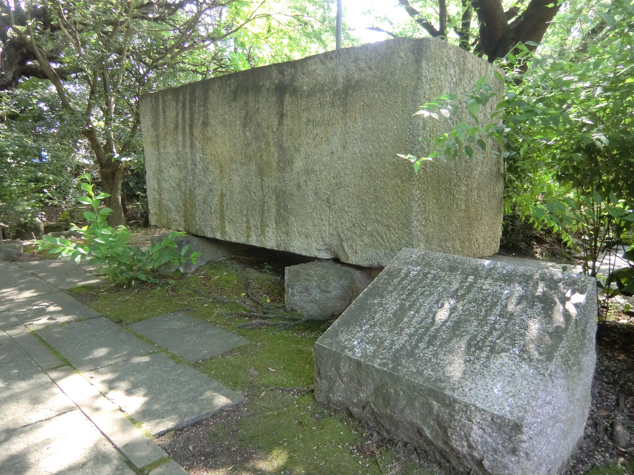 周南市文化会館前庭の大坂城築城の残石（山口県周南市）